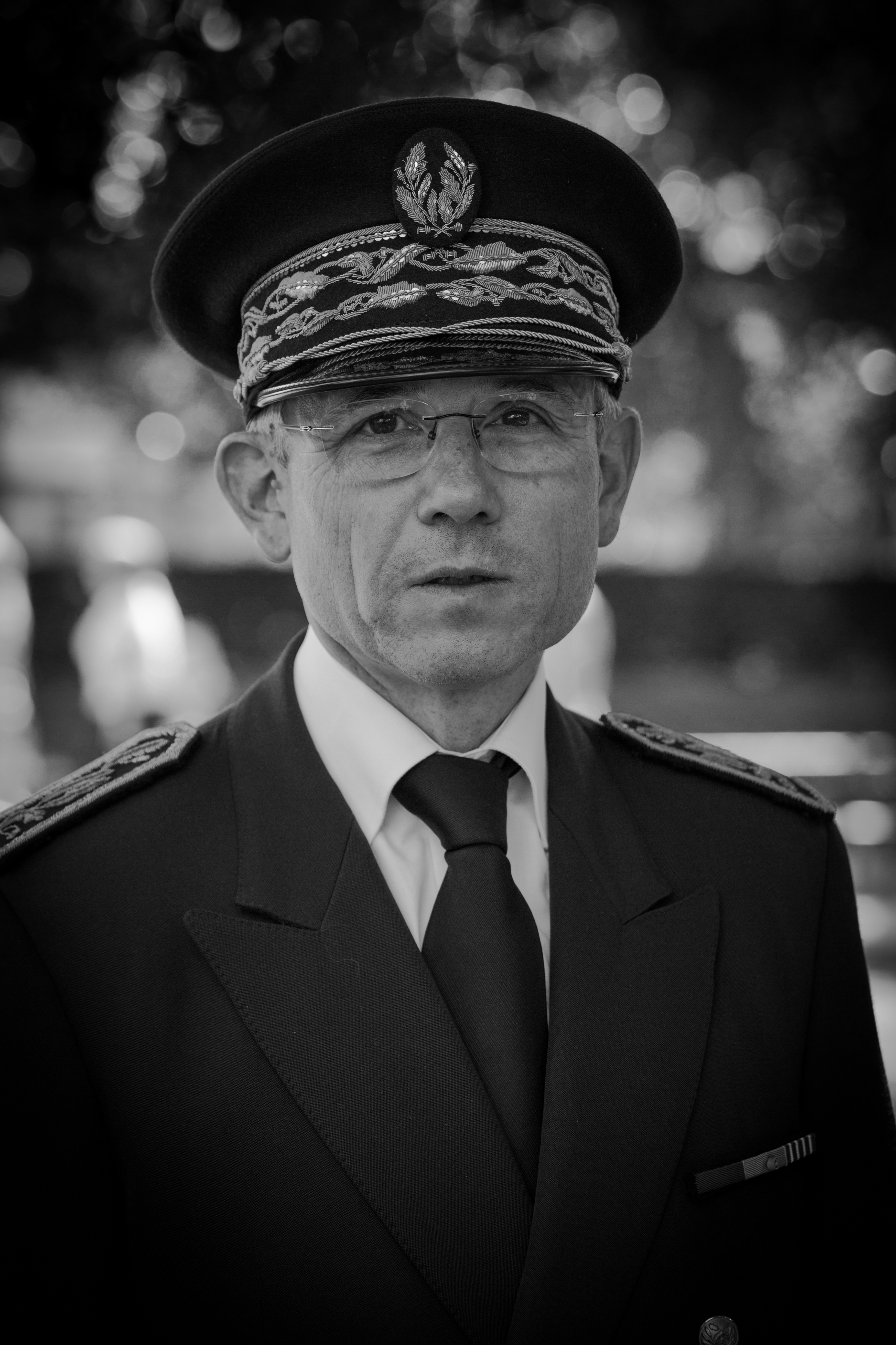 Stéphane Fratacci, préfet de l’Alsace et du Bas-Rhin depuis le 1er août 2015. Directeur de cabinet du Ministère de l’Intérieur en 2017.